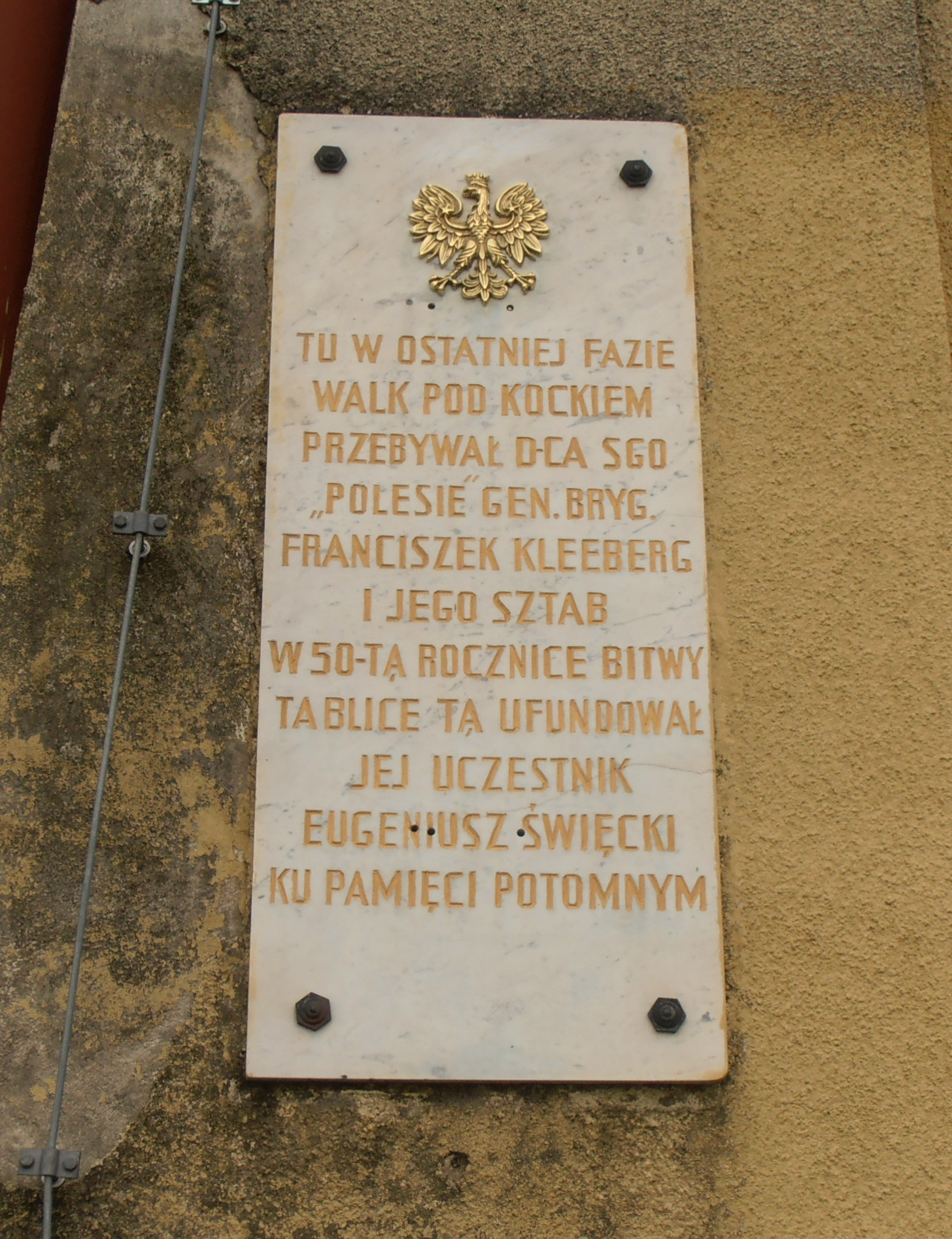 Stacja kolejowa w Krzywdzie (pow. łukowski, woj. lubelskie). Tablica upamiętniająca SGO „Polesie”.Treść inskrypcji: Tu w ostatniej fazie walk pod Kockiem przebywał d-ca SGO „Polesie” gen. bryg. Franciszek Kleeberg i jego sztab. W 50-tą rocznicę bitwy tablice tą ufundował jej uczestnik Eugeniusz Święcki ku pamięci potomnym.Stan w roku 2017.